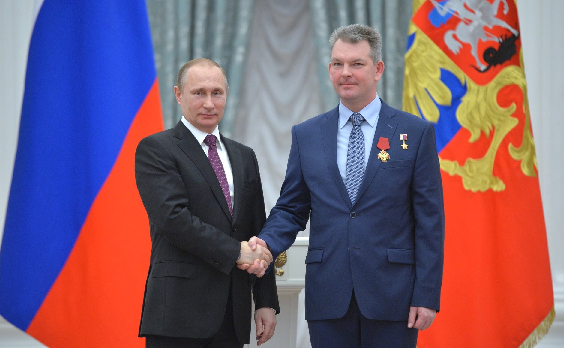 Церемония вручения государственных наград Российской Федерации. Орденом «За заслуги перед Отечеством» IV степени награждён инструктор-космонавт-испытатель Центра подготовки космонавтов имени Ю. А. Гагарина Александр Самокутяев